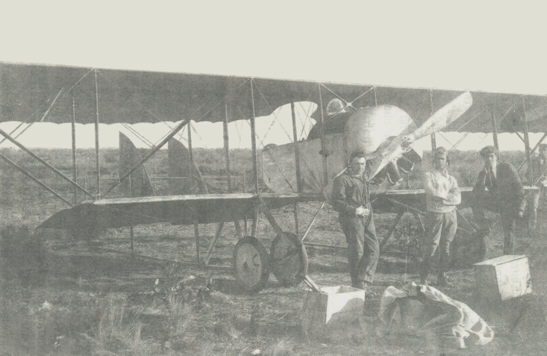 Foto tirada em Itapetininga, SP; vendo-se ao centro o capitão Busse. No verso, a dedicatória a lápis: "À mascotinha com toda a minha affeição." 30/5/1921.